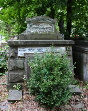 Гробниця Осташевських - Баранських.Личаківський цвинтар , поле № 59.